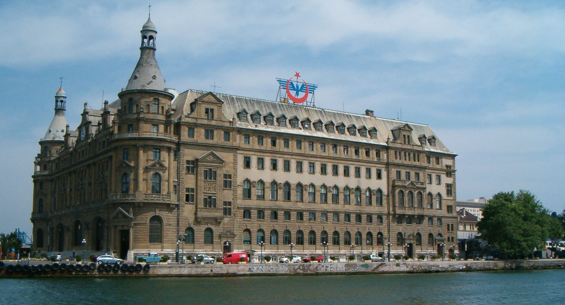 Haydarpasa train station